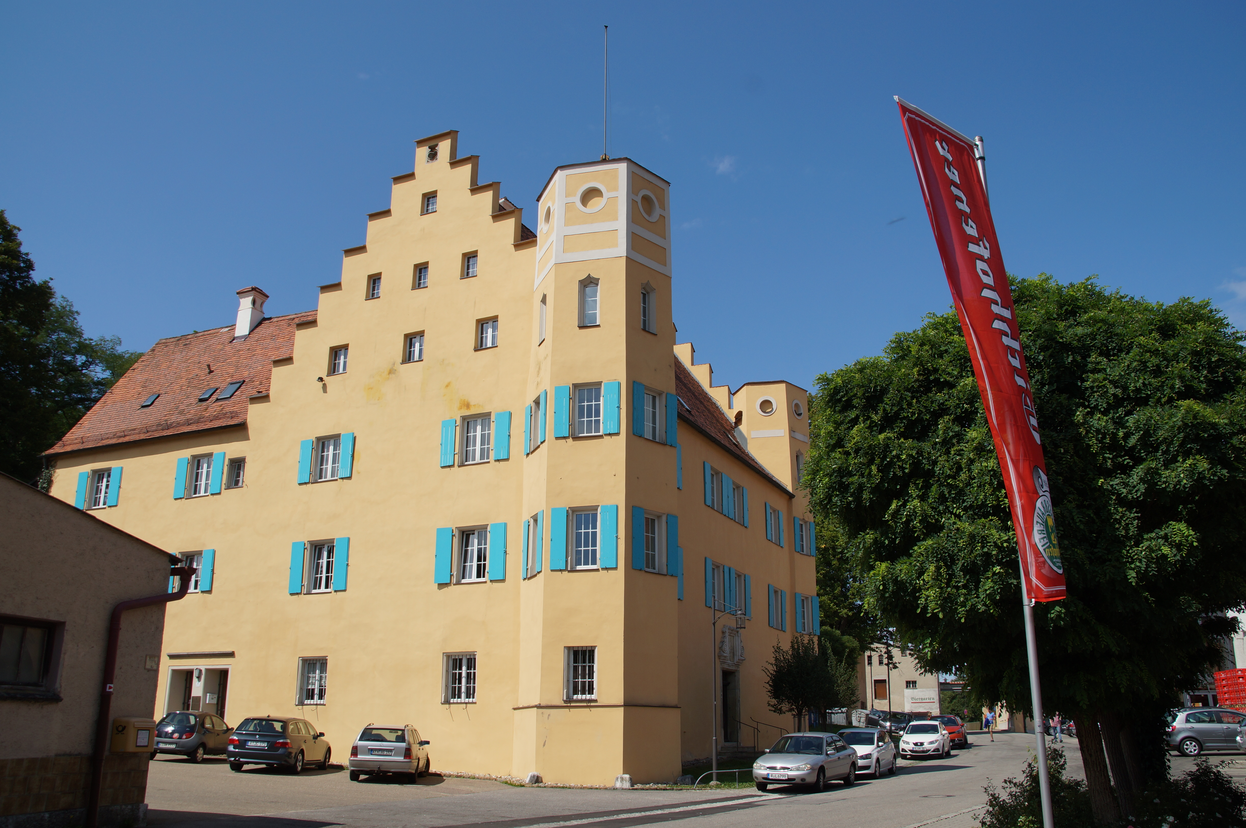 Schloss Eichhofen, dreigeschossiger und traufständiger Satteldachbau mit Treppengiebel, Eckerkern, Renaissanceportal und westlichem Flügel, um 1580, Umbau um 1720/30, Fassaden 1866 von Ludwig Foltz, 1939 purifizierende Sanierung; Gartenmauer, teilweise mit Zinnen und Straßenportal, neugotisch, um 1866 wohl von Ludwig Foltz.